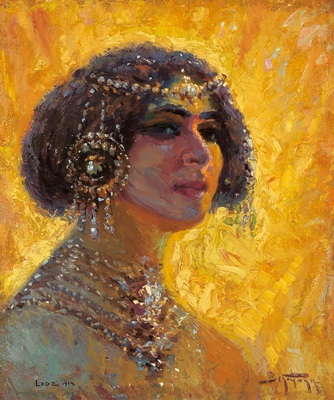 Jüdische Braut aus Łódź